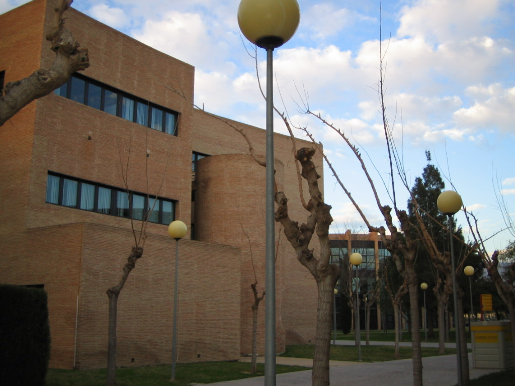 Fotografía en la que aparece uno de los laboratorios de la Universidad Miguel Hernández y la bliblioteca de ésta, ambos del campus de Desamaparados, Orihuela.